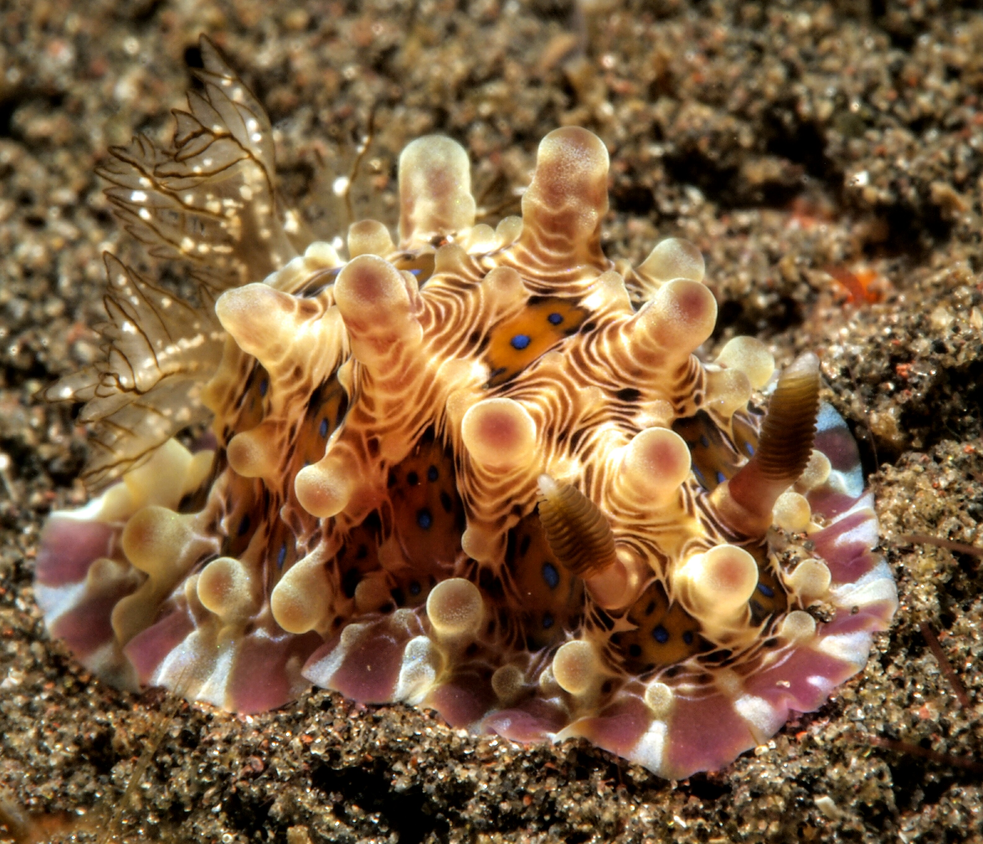 Dendrodoris krusensternii (sinonimia: Dendrodoris denisoni), Bali, Indonesia